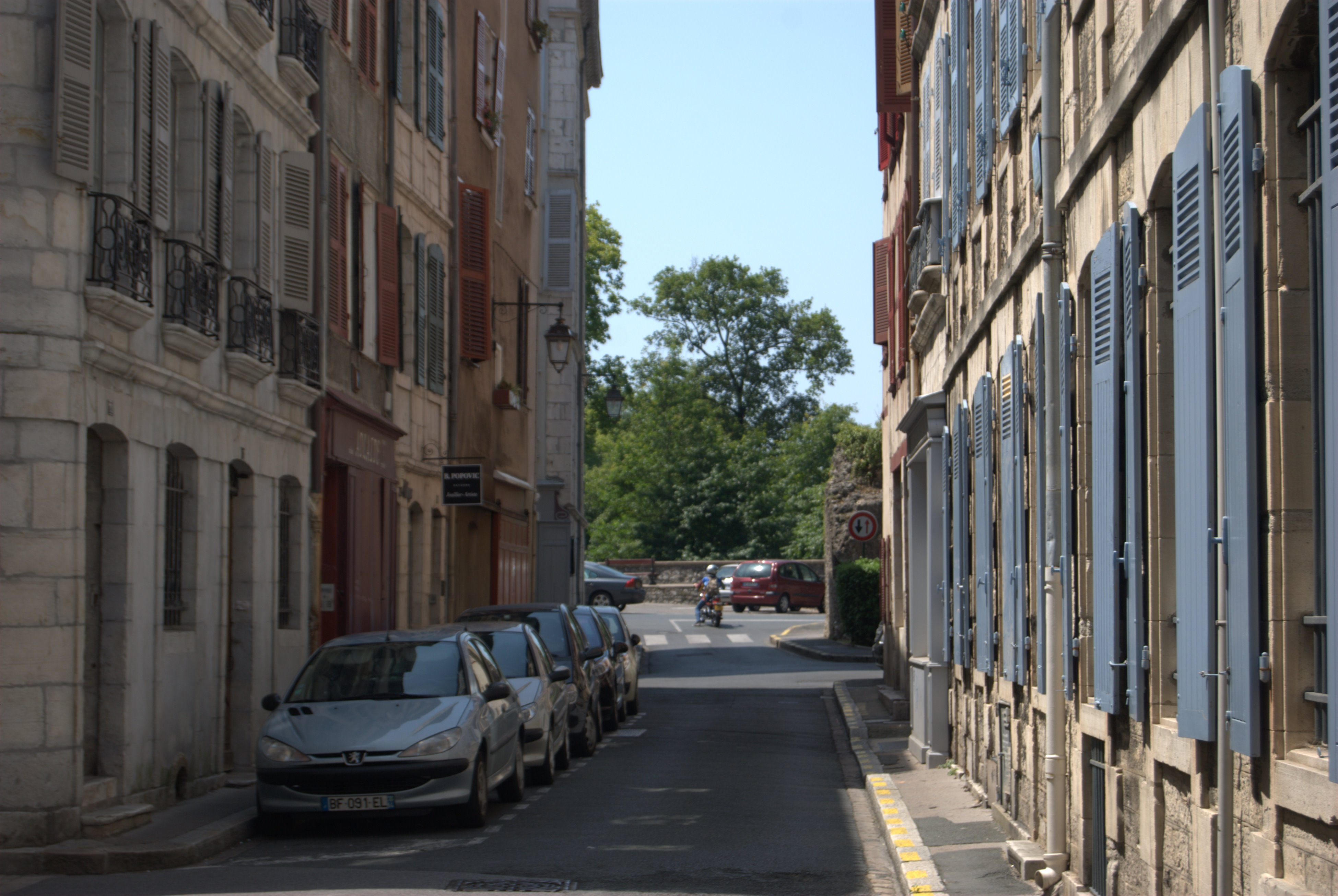 La rue des Prébendés depuis la rue des Gouverneurs, vers les remparts.